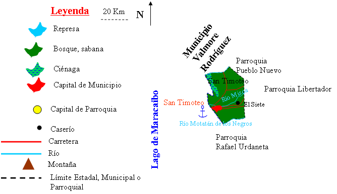 Mapa Parroquia San Timoteo, Municipio Baralt, Estado Zulia, Venezuela